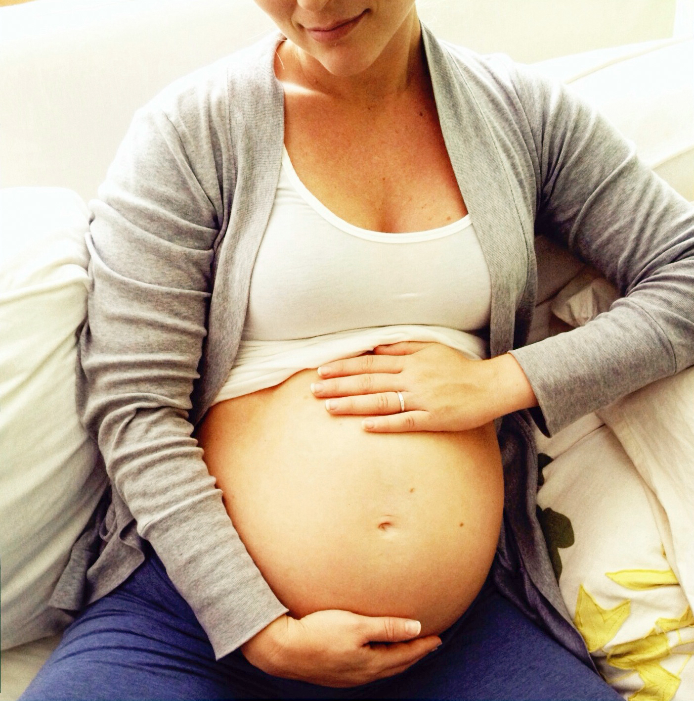 pregnant in Los Angeles